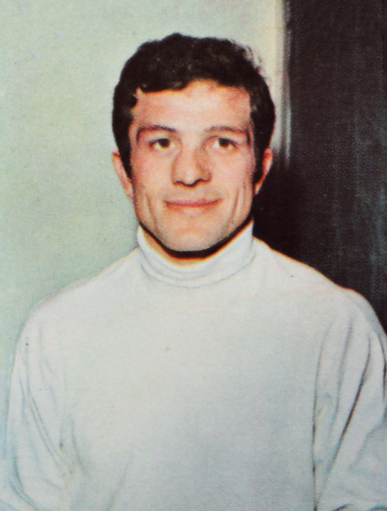 Figurina CAMPIONI DELLO SPORT 1969/70-n.336-BERTINI (ITA)-PUGILATO-rec